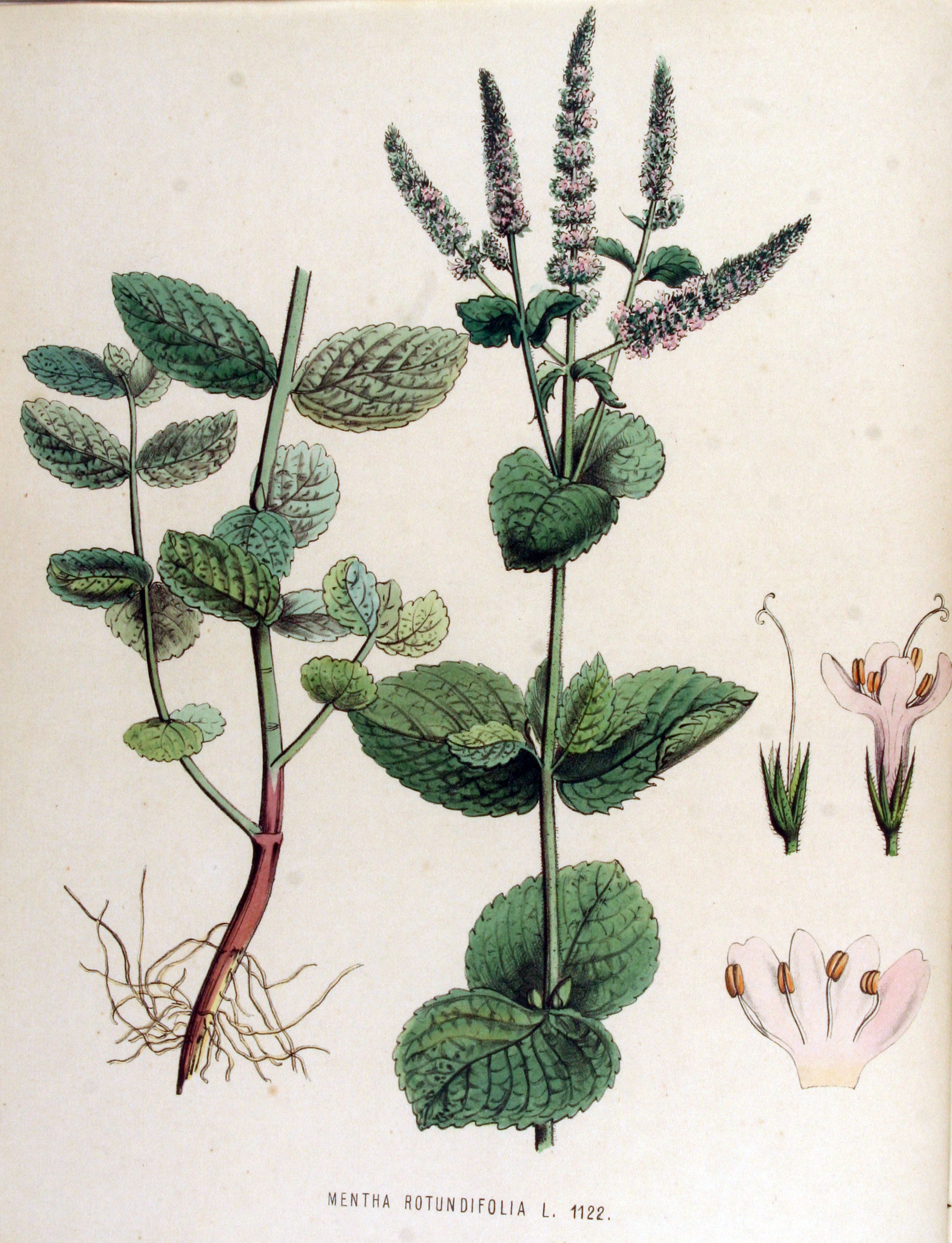 Mentha suaveolens Ehrh. (Syn. Mentha rotundifolia auct. non (L.) Huds.)